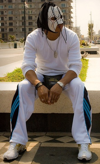 Trauma